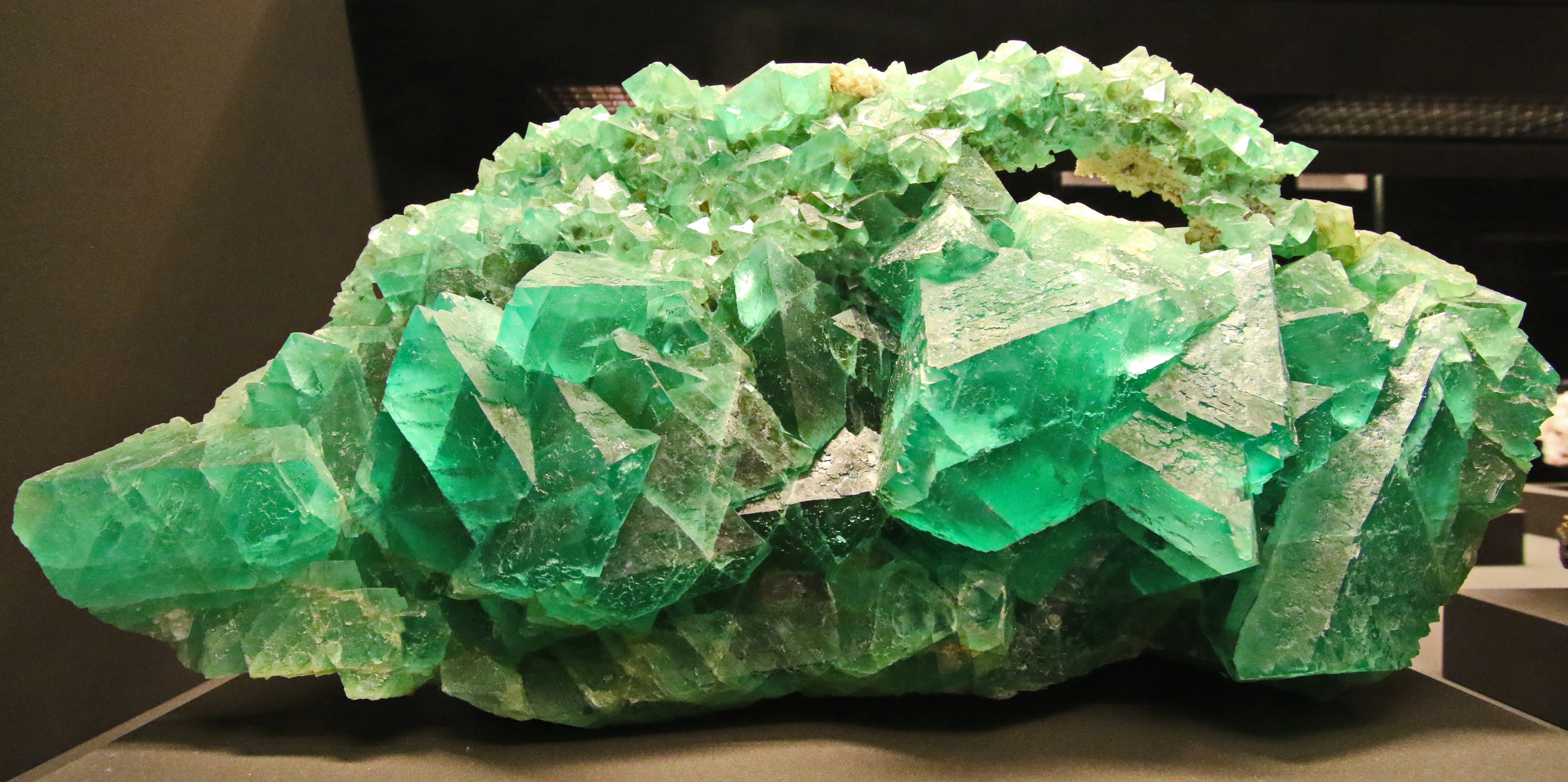 Fluorit, Südafrika.Terra Mineralia. Mineralienausstellung TU Bergakademie Freiberg. Schloss Freudenstein Schlossplatz 4 09599 Freiberg.